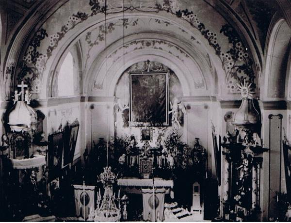 Kostel sv. Petra a Pavla, historicka fotografie